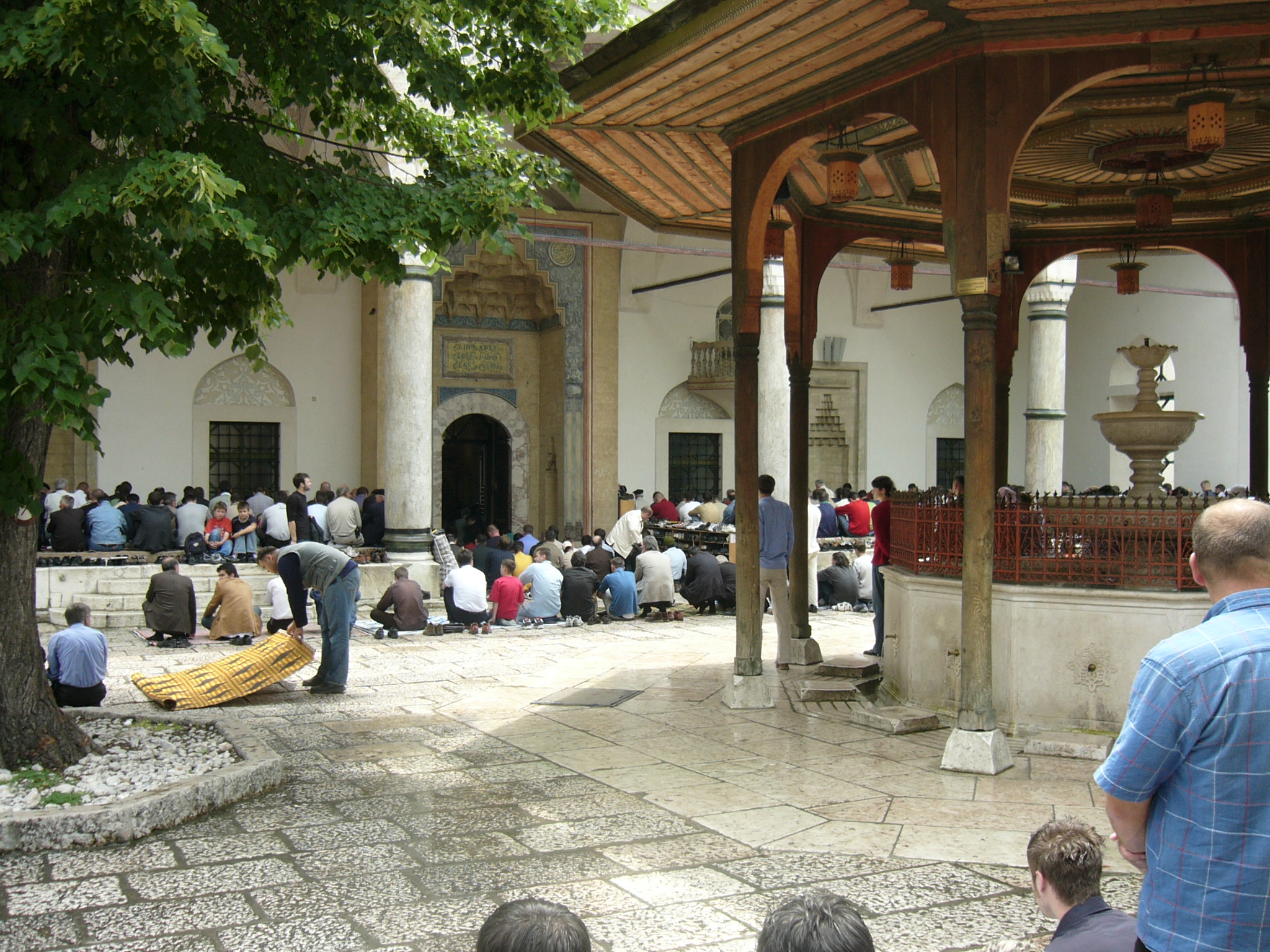 Dvorište džamije.